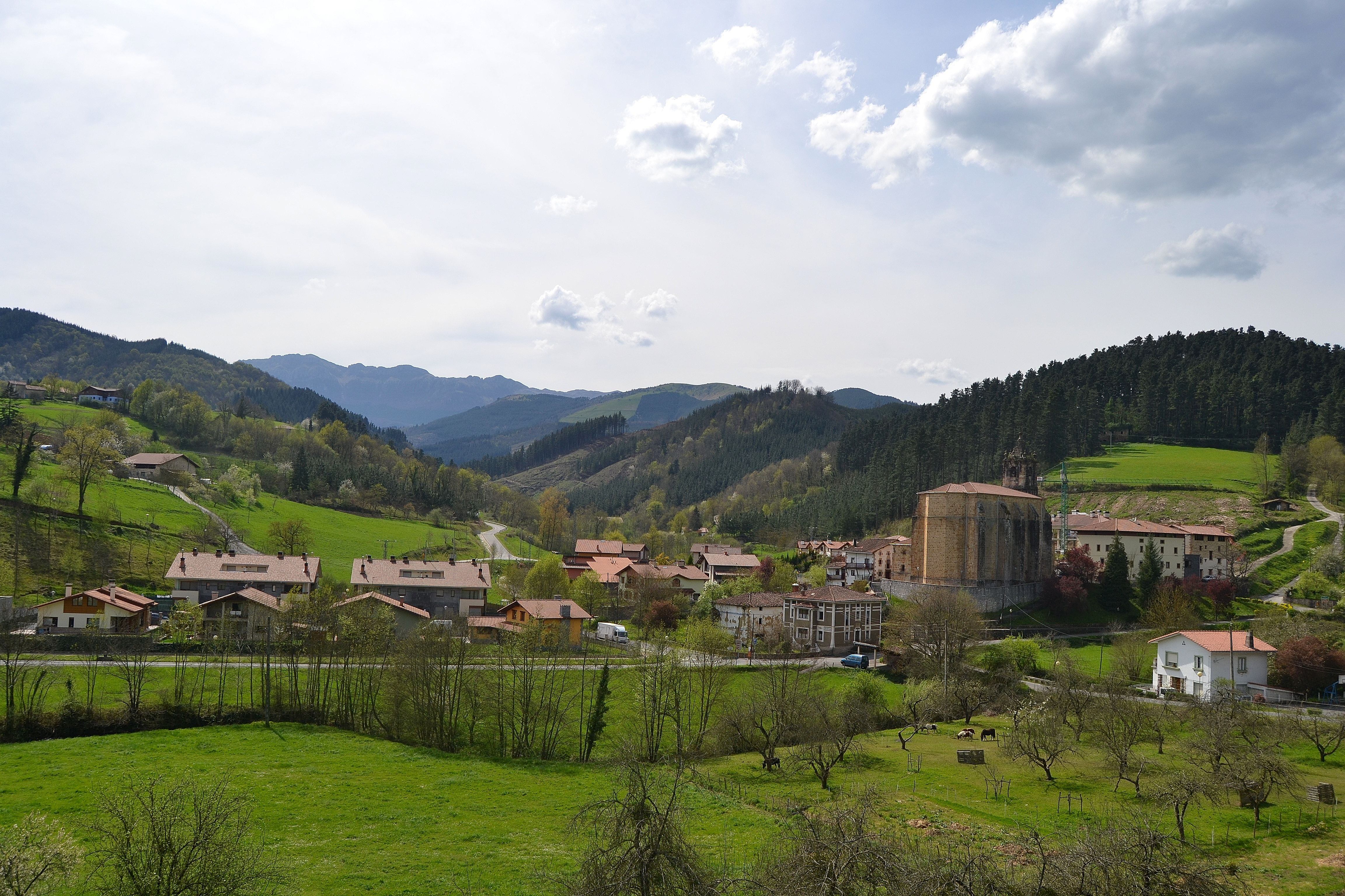 Mutiloa udalerriko ikuspegi orokorra. Goierri, Gipuzkoa. Euskal Herria. General view of Mutiloa village. Goierri, Gipuzkoa. Basque Country.